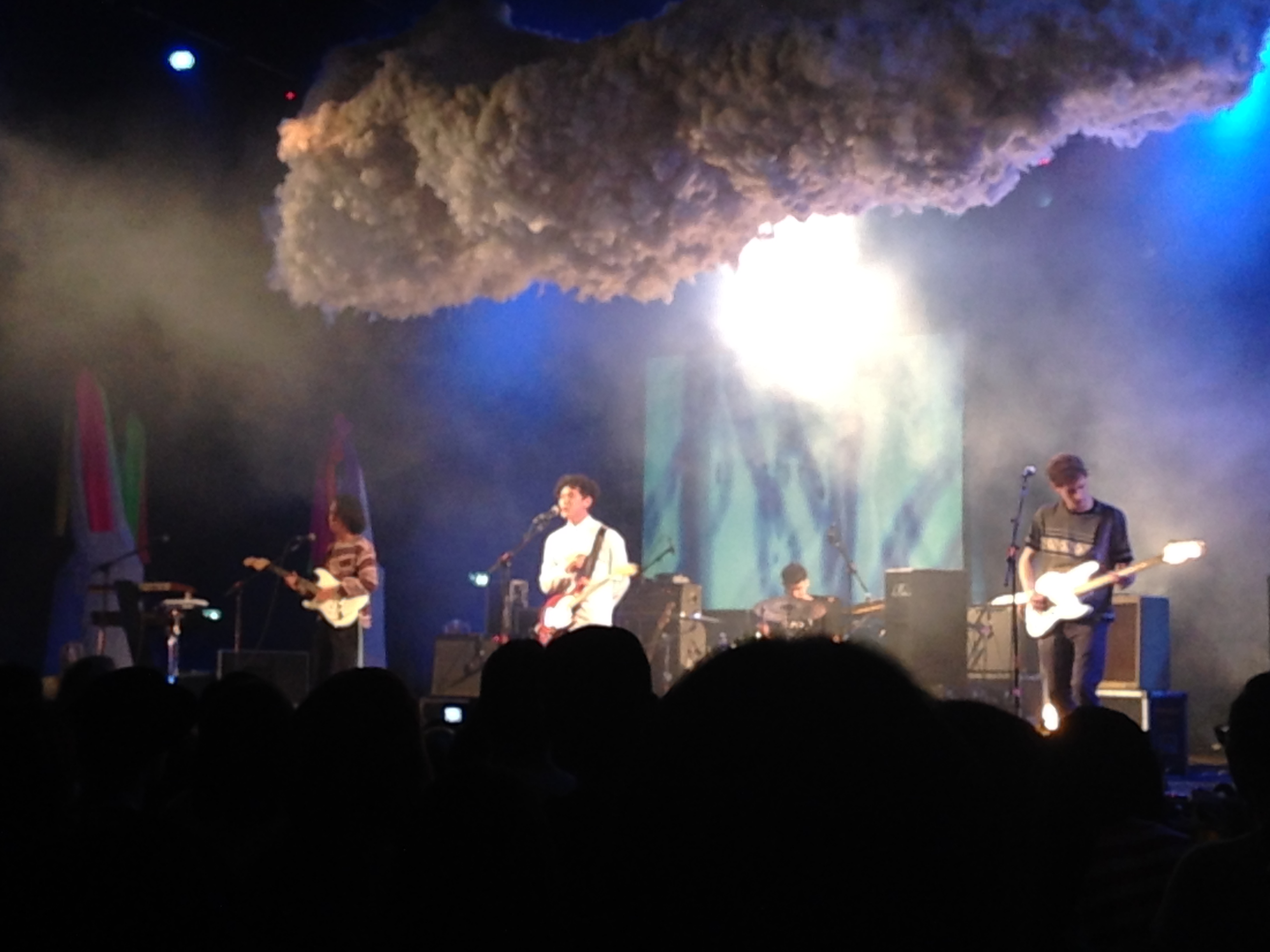 Last Dinosaurs live in Bangkok.